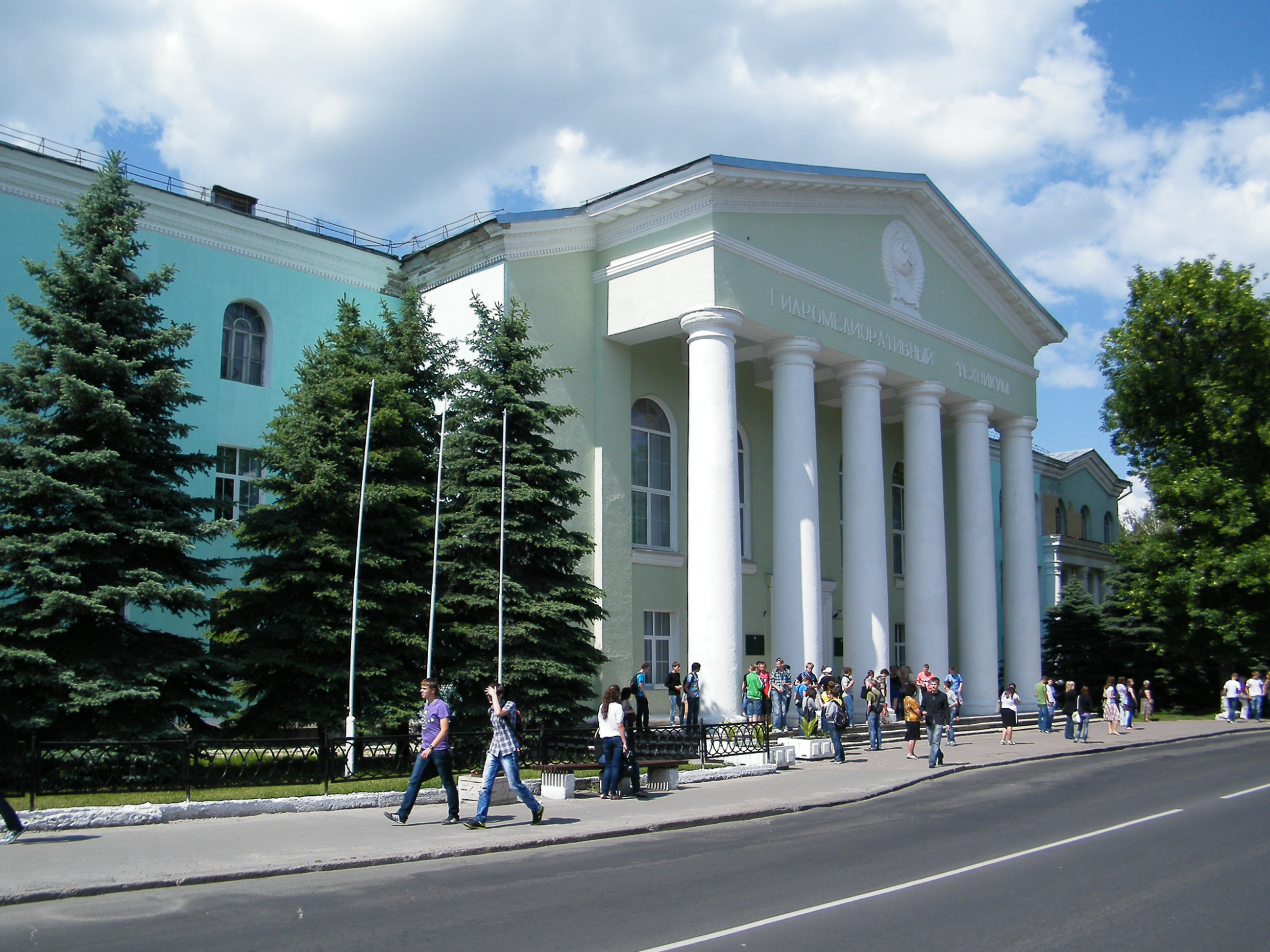 Здание Гидромелиоративного техникума